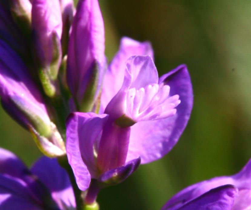 Polygala vulgaris